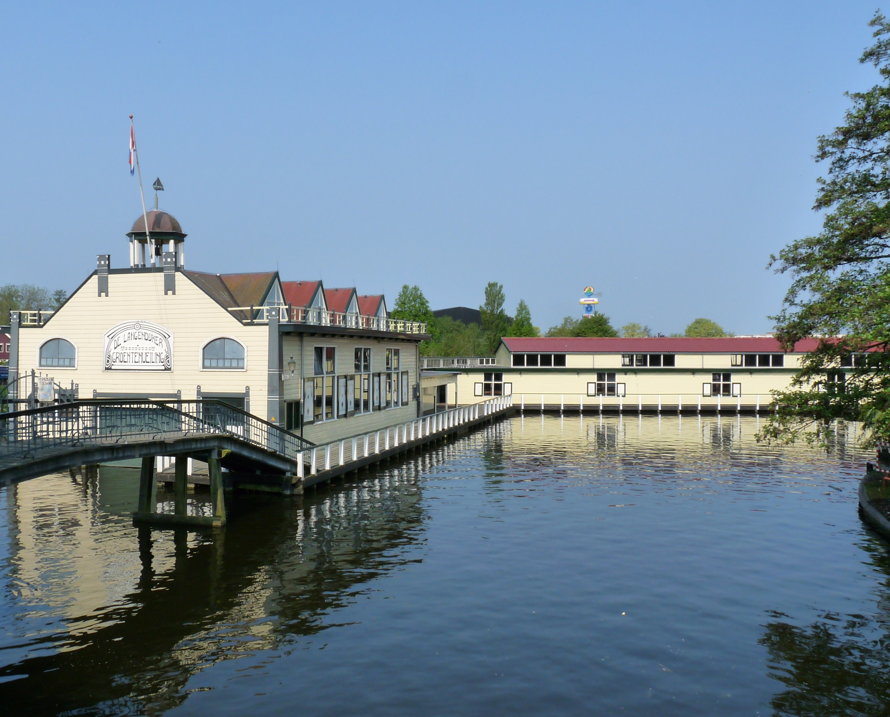 foto van de broeker veiling